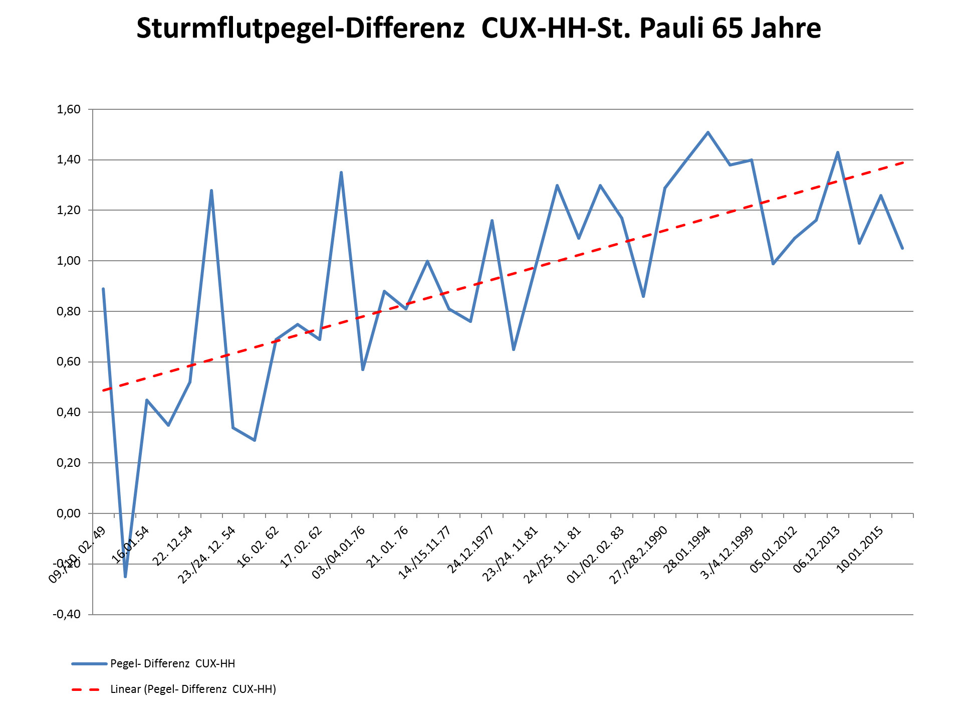 Sturmflutpegel-Differenzen Cuxhaven und HH-St.Pauli 65 Jahre